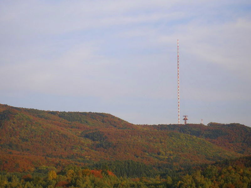 Jeseň nad obcou Zlatá Baňa okres Prešov, región Šariš